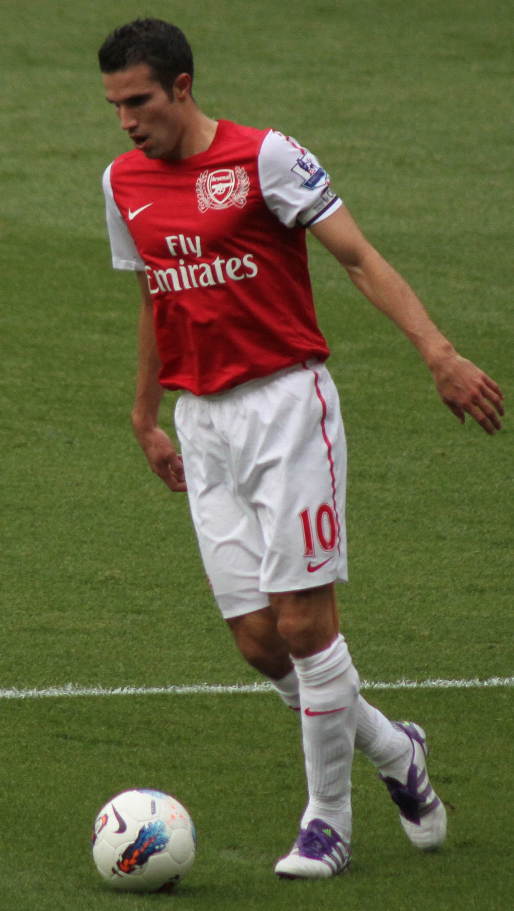 Robin van Persie playing against Swansea in 2011